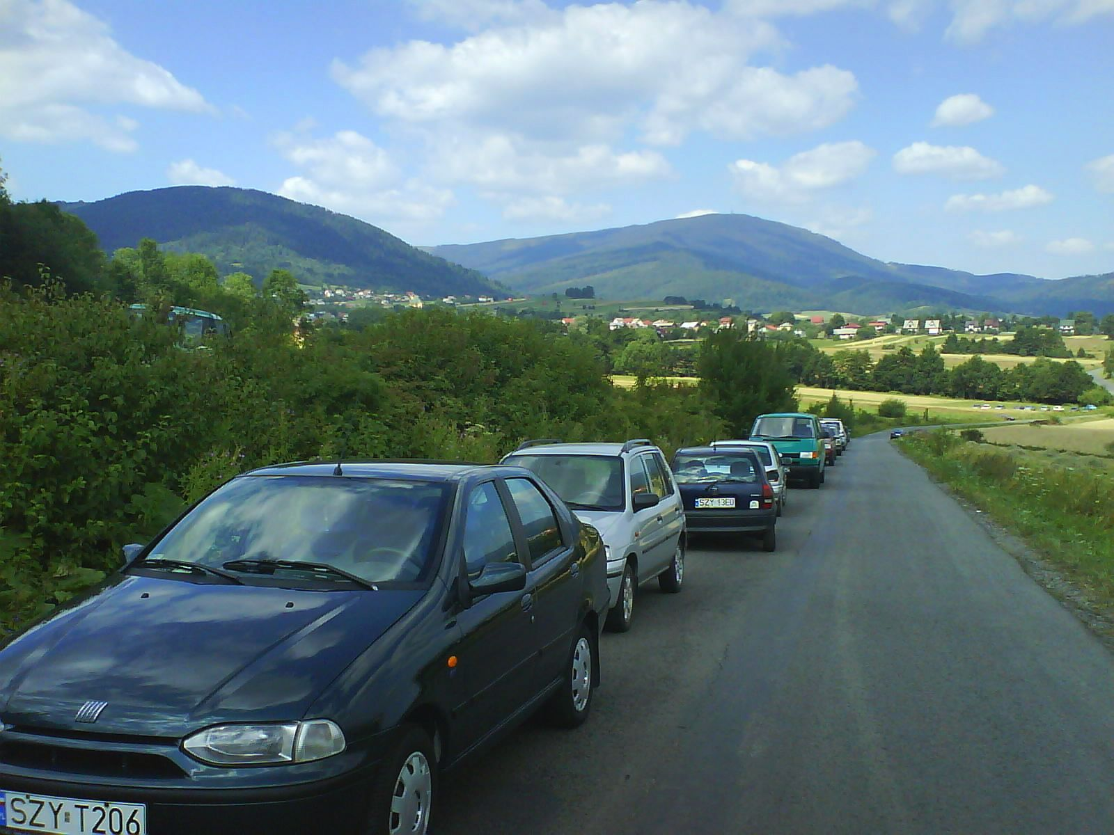 Ulica Lipowa biegnąca w stronę Twardorzeczki